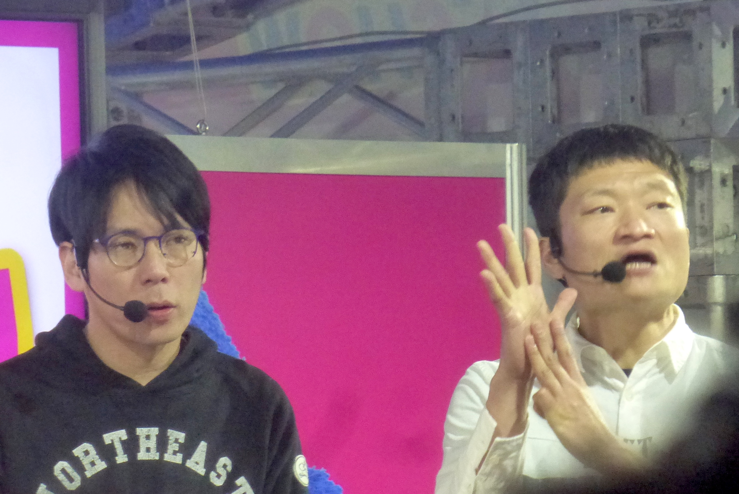 ザブングルは、ワタナベエンターテインメント所属のお笑いコンビ。